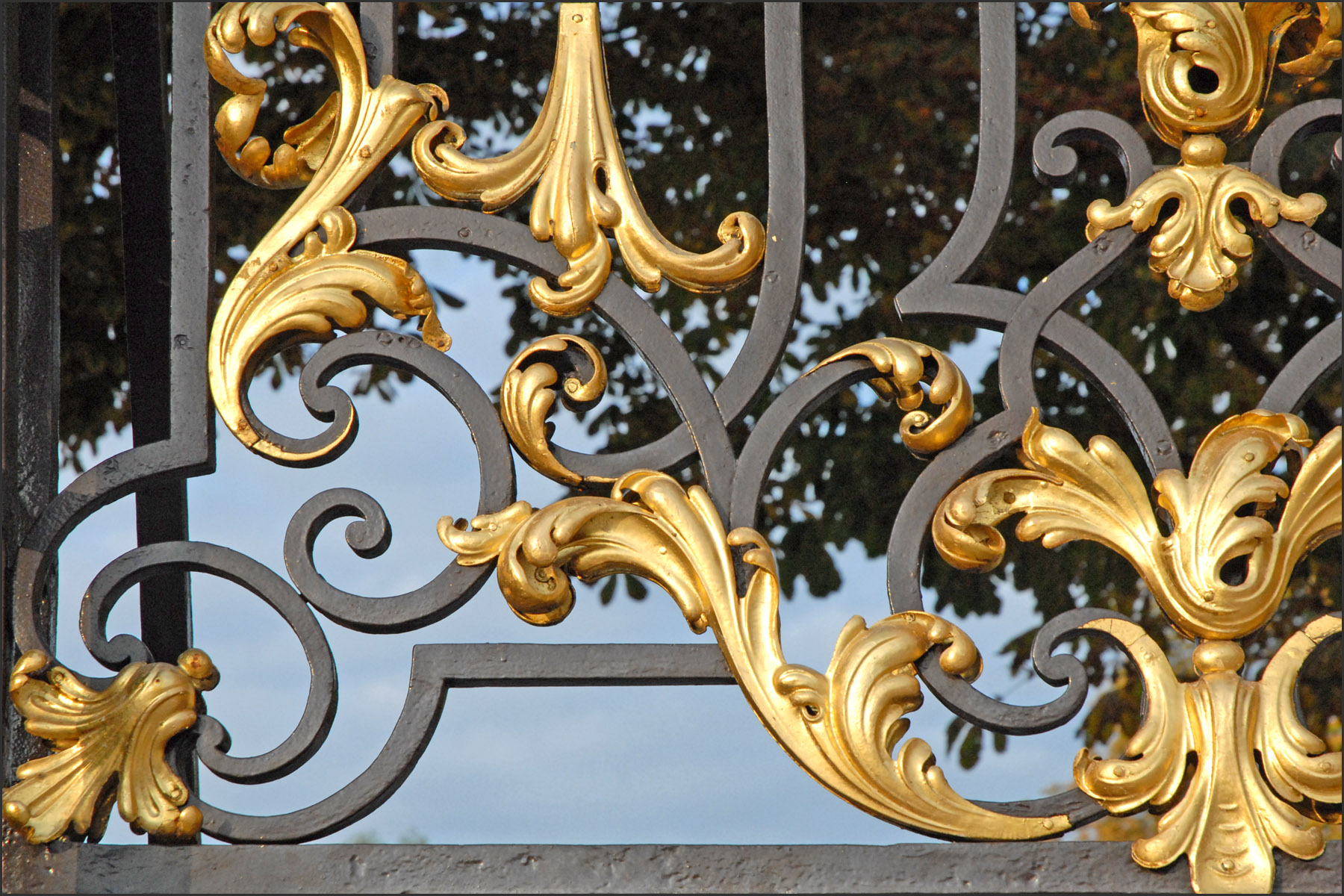 Ferronneries de Jean-Baptiste Lamour (1698- 1771) de la place Stanislas réalisées entre 1751 et 1755 dans le style Louis XV avec pour décors des feuilles d'acanthe, coquilles, vases de fleur, animaux recouverts de dorure.